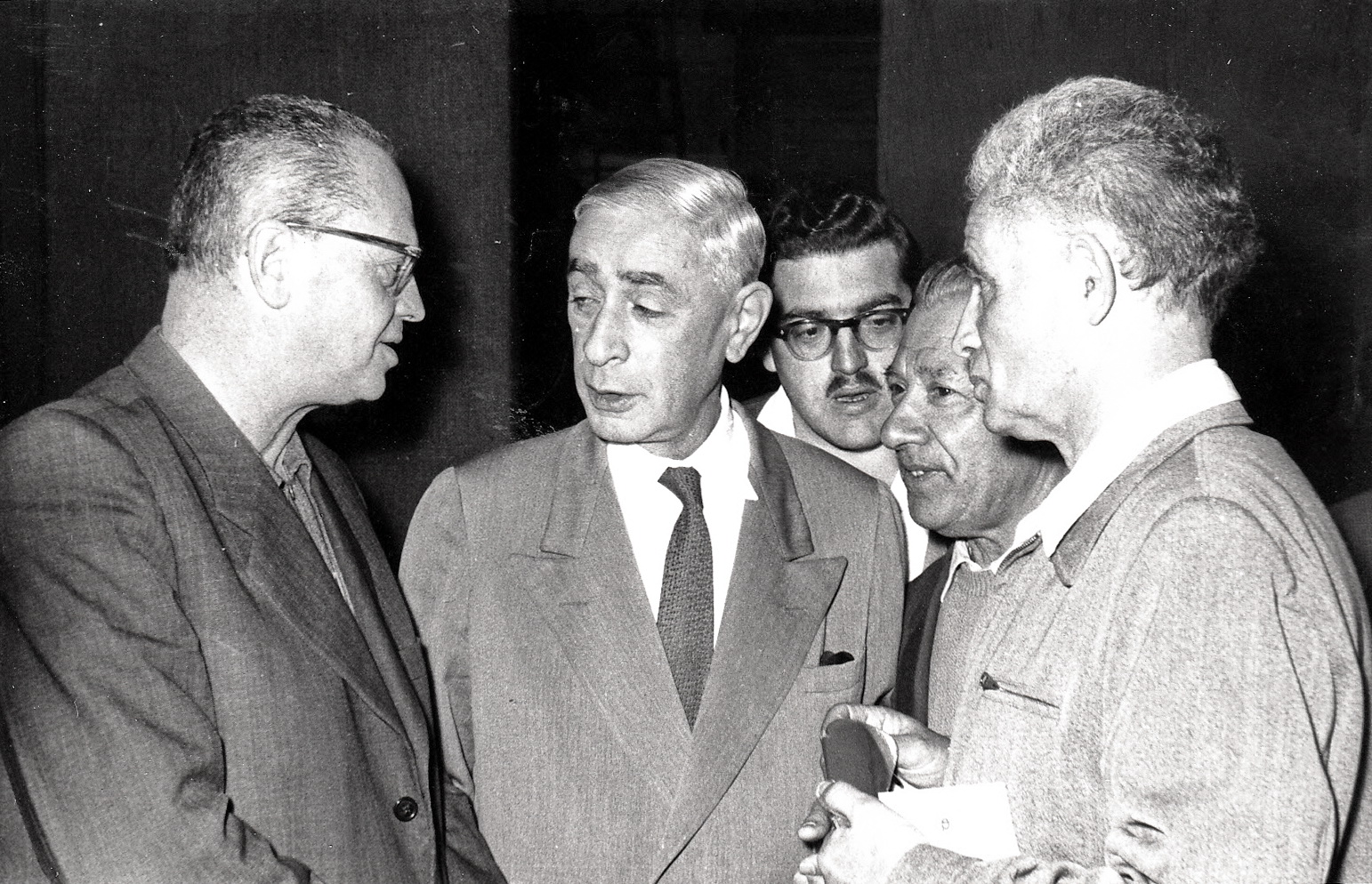 מימין לשמאל - ברל רפטור פנחס לבון, מזכיר ההסתדרות ז. און. מועצת ההסתדרות 11.2.1956 תל אביב